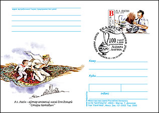 Почтовая карточка № 40, выпущенная к 100-летию со дня рождения Лазаря Лагина. Художник - Татьяна Дольская. Иллюстрация - Л. И. Лагин — автор повести-сказки для детей «Старик Хоттабыч», — на бел. языке, главные герои повести Старик Хоттабыч и Волька на ковре-самолете.